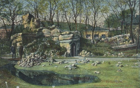 Erlangen. Die Neischl-Grotte im Botanischen Garten.